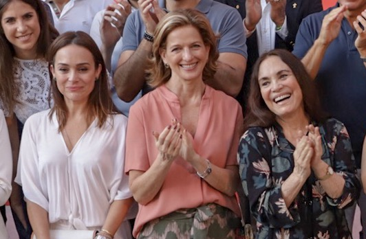 O governador do estado de São Paulo, João Doria, participa da inauguração da Creche Anglicana e da Escola da Cultura Inglesa em Paraisópolis na capital paulista. Local: Indaiatuba/SP. Data: 24/03/2019 Foto: Governo do Estado de São Paulo